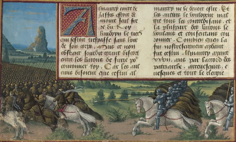 Miniature: Bataille d'Al-Buqay'a (1163)